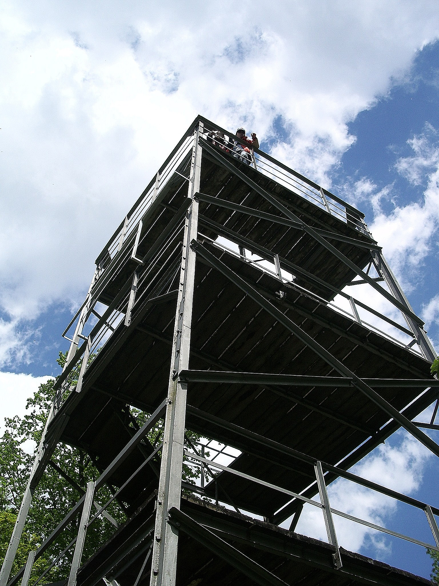 Siblingerrandenturm